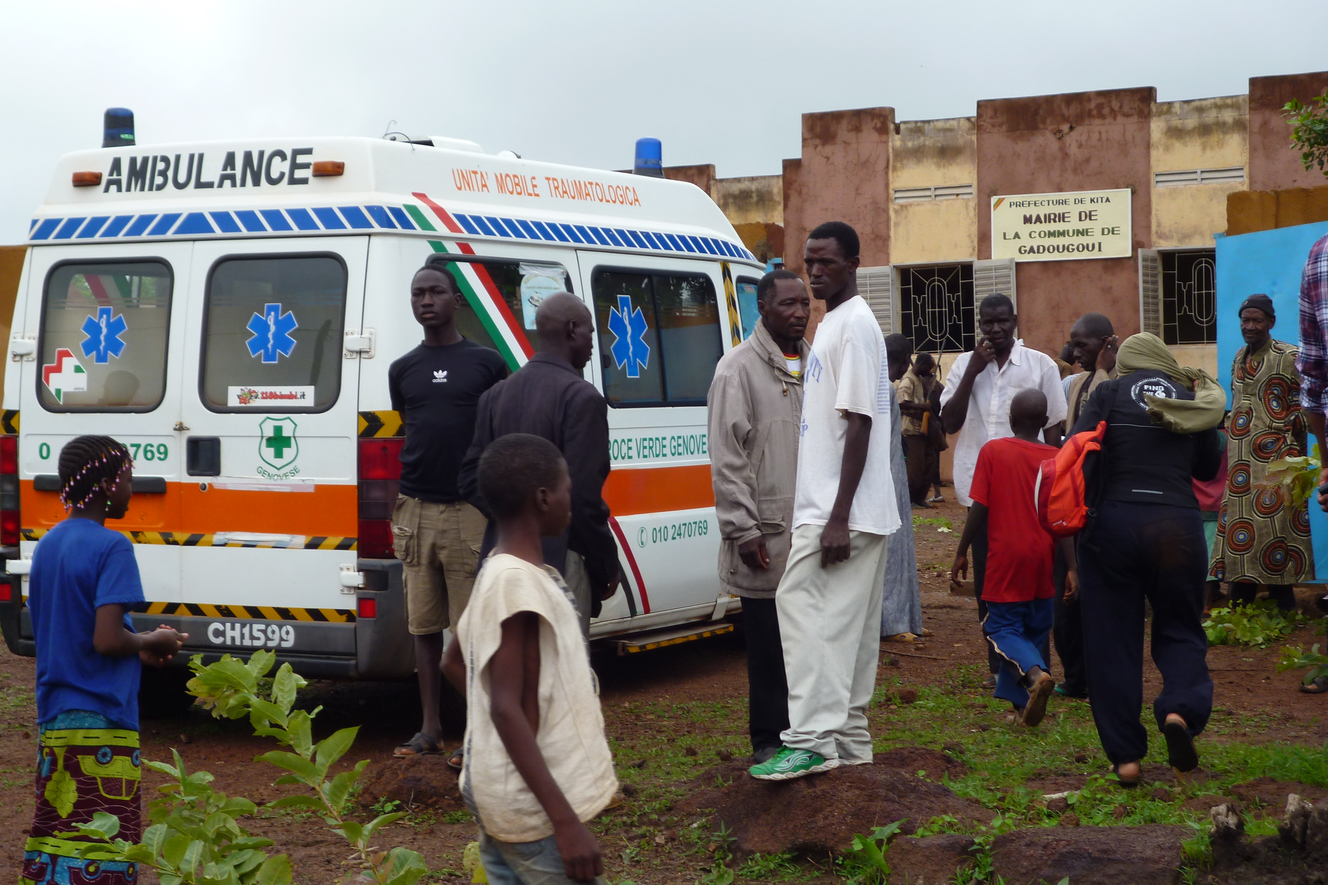 Consegna dell'ambulanza del CIS all'ospedale di Kità in Malì